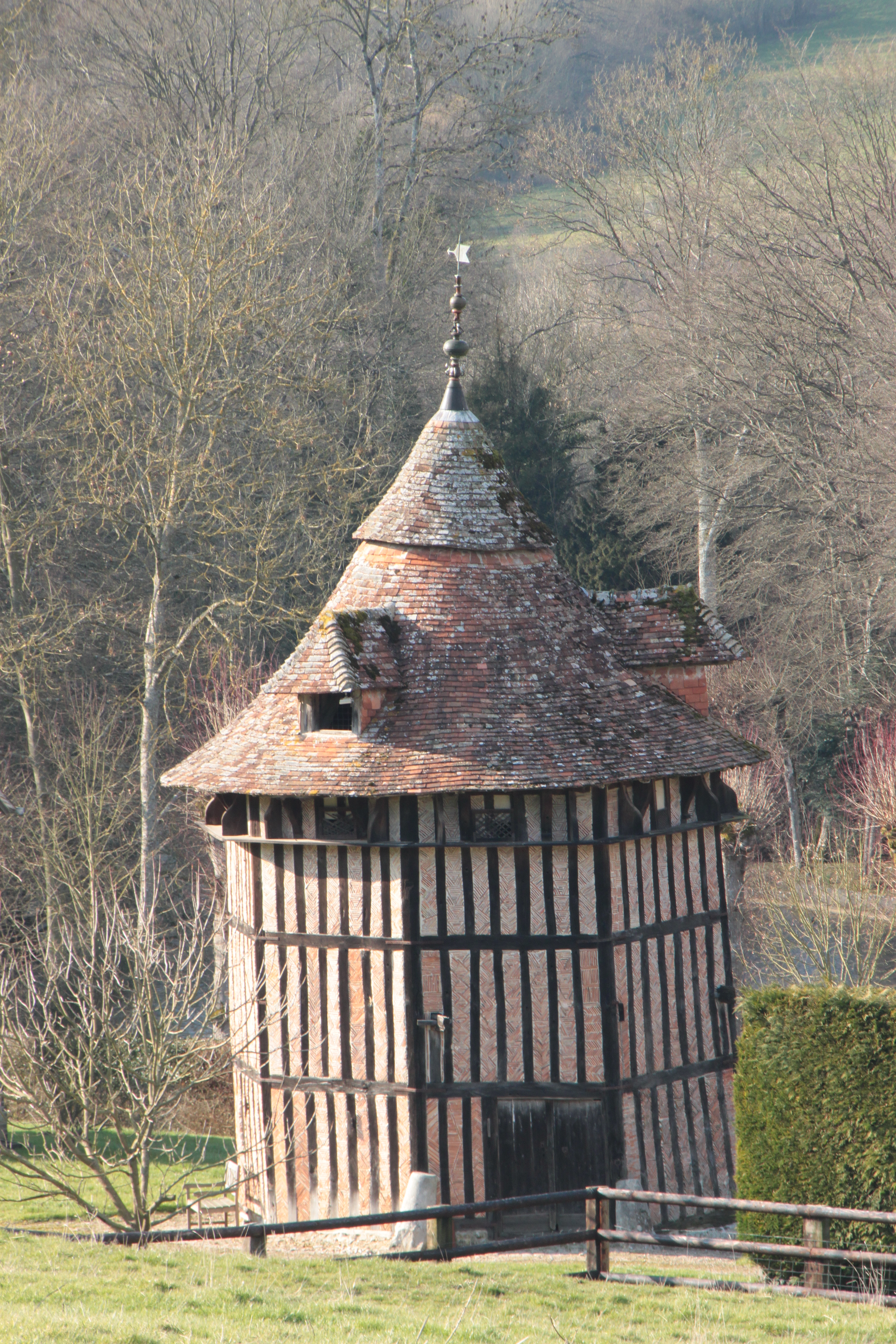 ancien colombier du manoir du Mesnil-Germain (Calvados), France ; XVIIe siècle. .